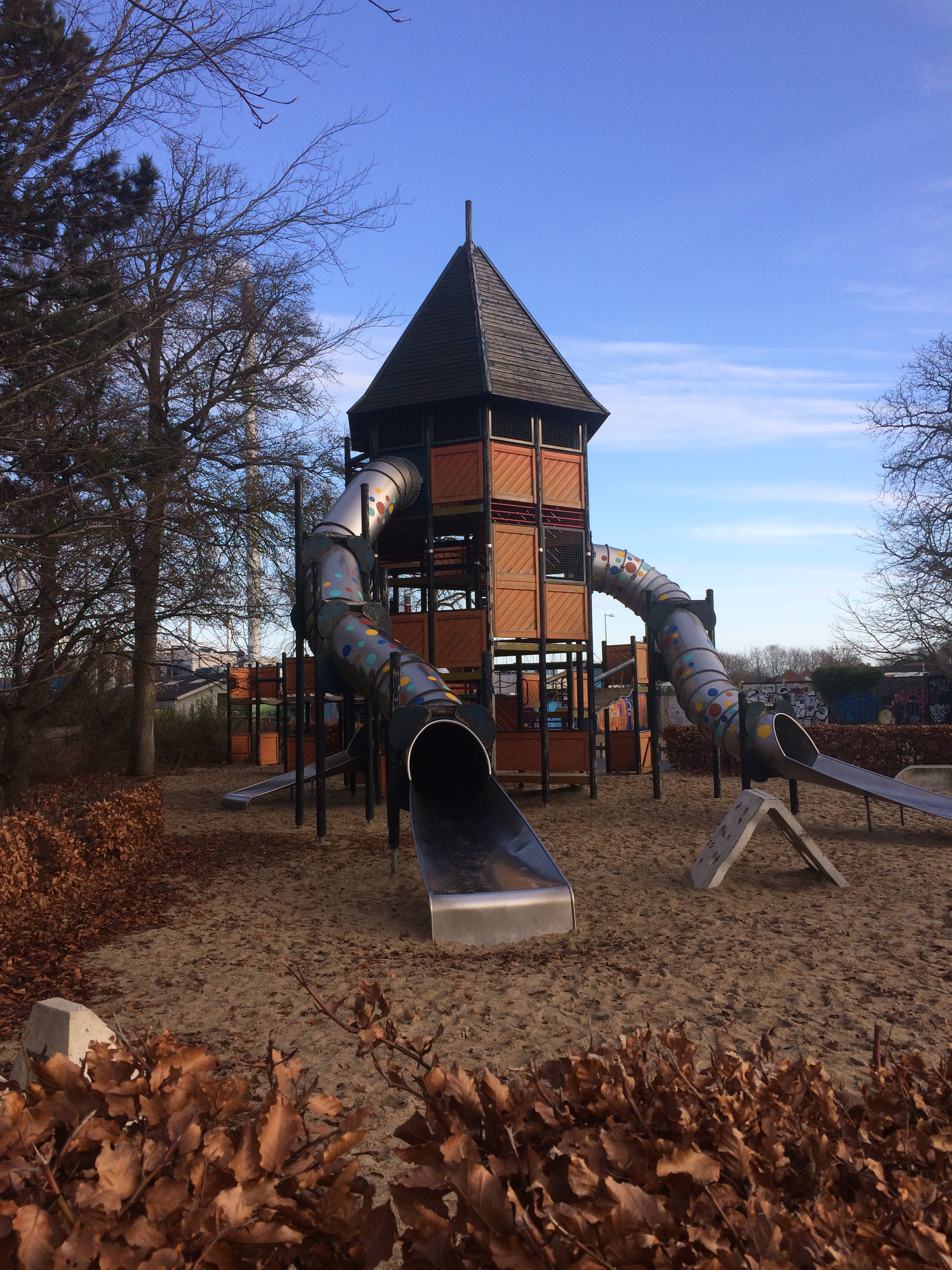 Legepladsen fra det tidligere Tivoli der lå i Karolinelund, og er en af få ting der stadig står i parken, efter den blev til bypark